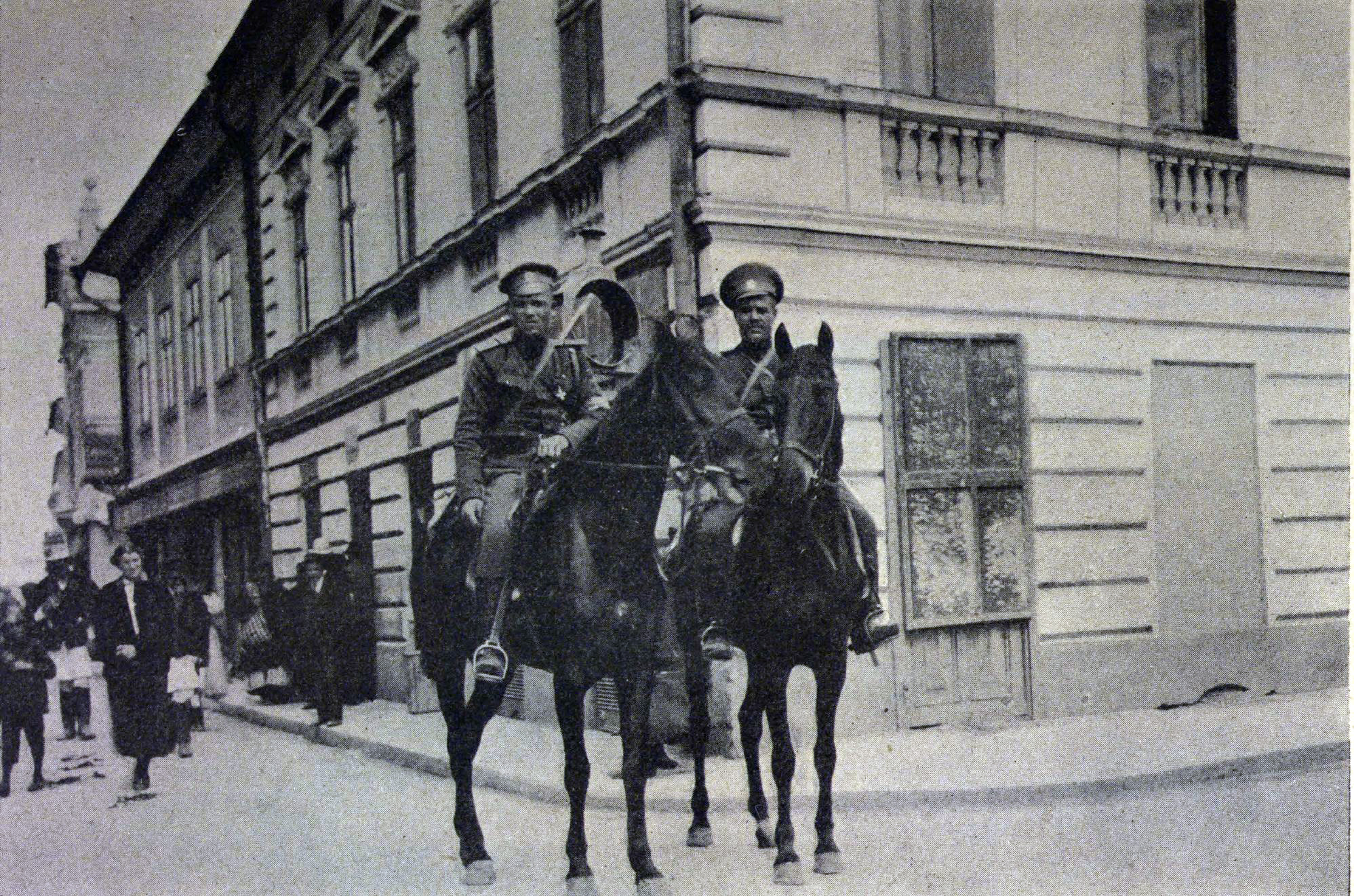 «Наши патрули в г. Станиславове» // Великая война в образах и картинах : [в 14 вып.] / под ред. Ив. Лазаревского. — М.: Издание Д. Я. Маковского, 1914-1917 (Товарищество типографии А. И. Мамонтова); [Вып. 12]. — 1916 — С.154.